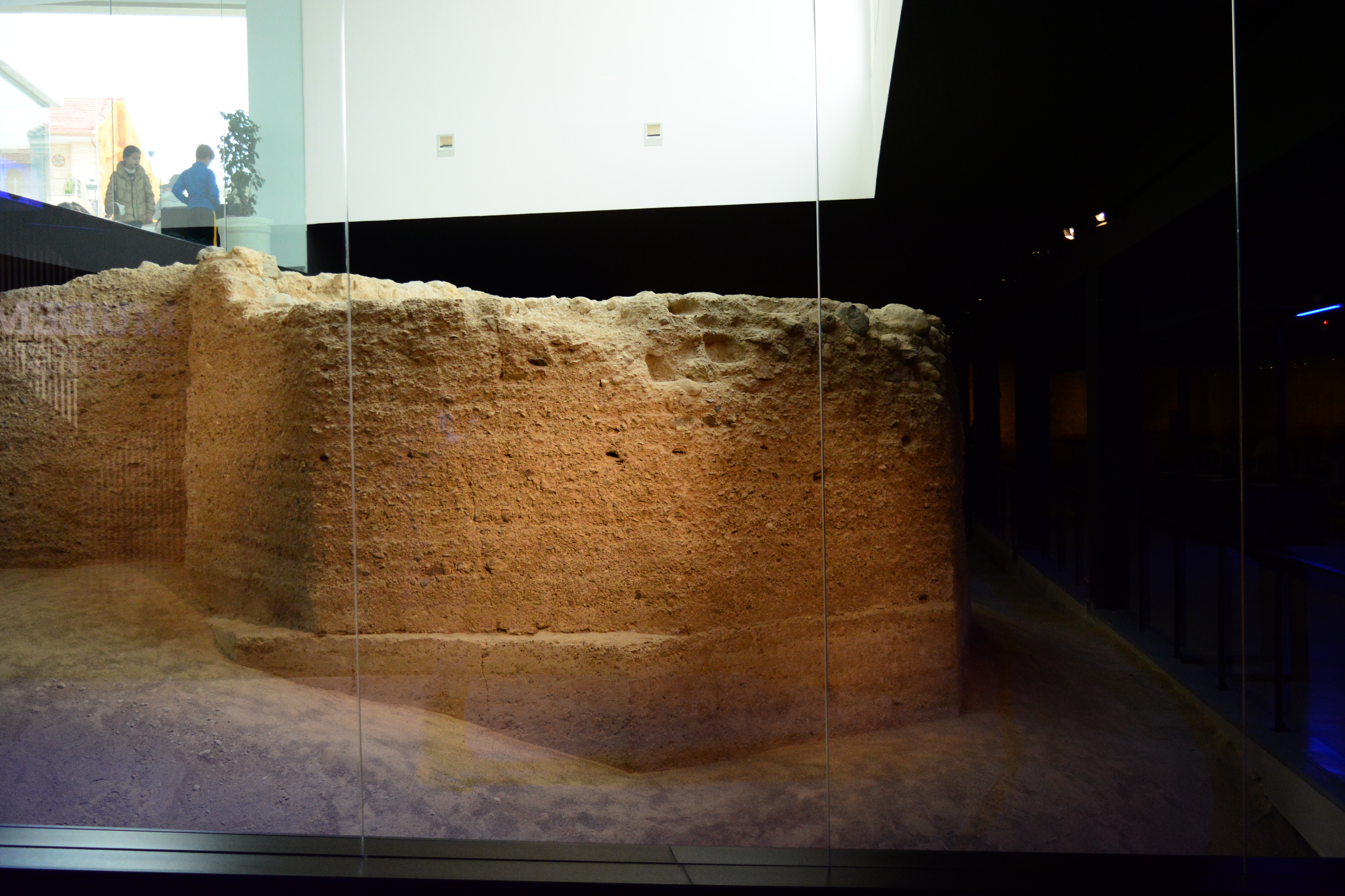 torre de 9 lados de la Muralla de Molina de Segura